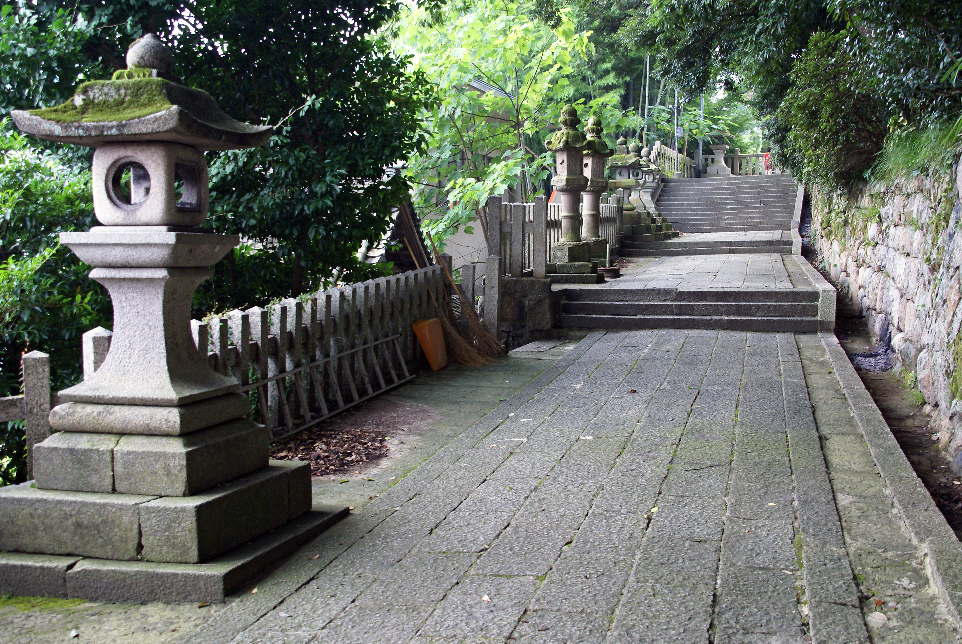 Asashiro-jinja in Maizuru, Kyoto prefecture, Japan